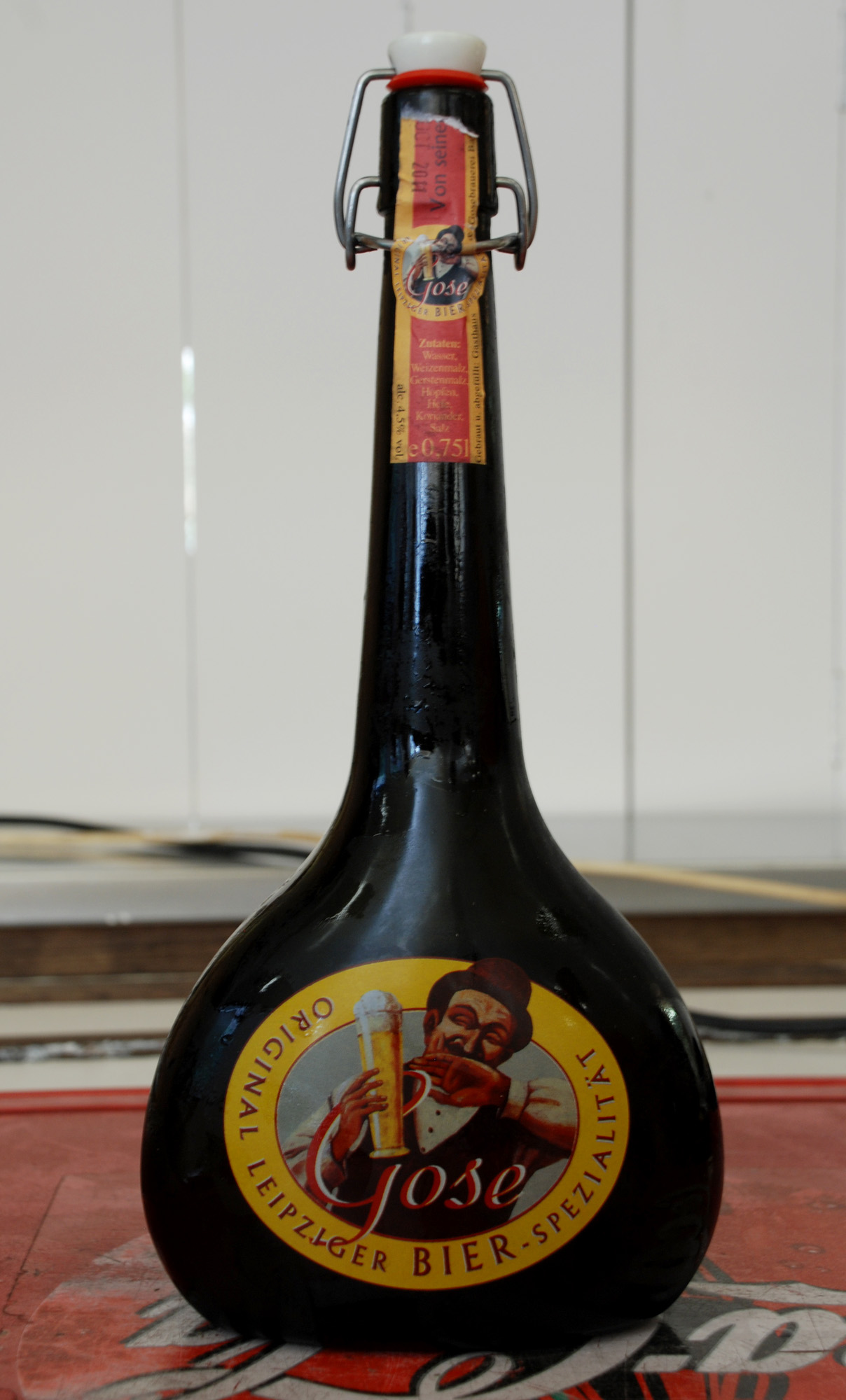 Gose, bier Leipzig